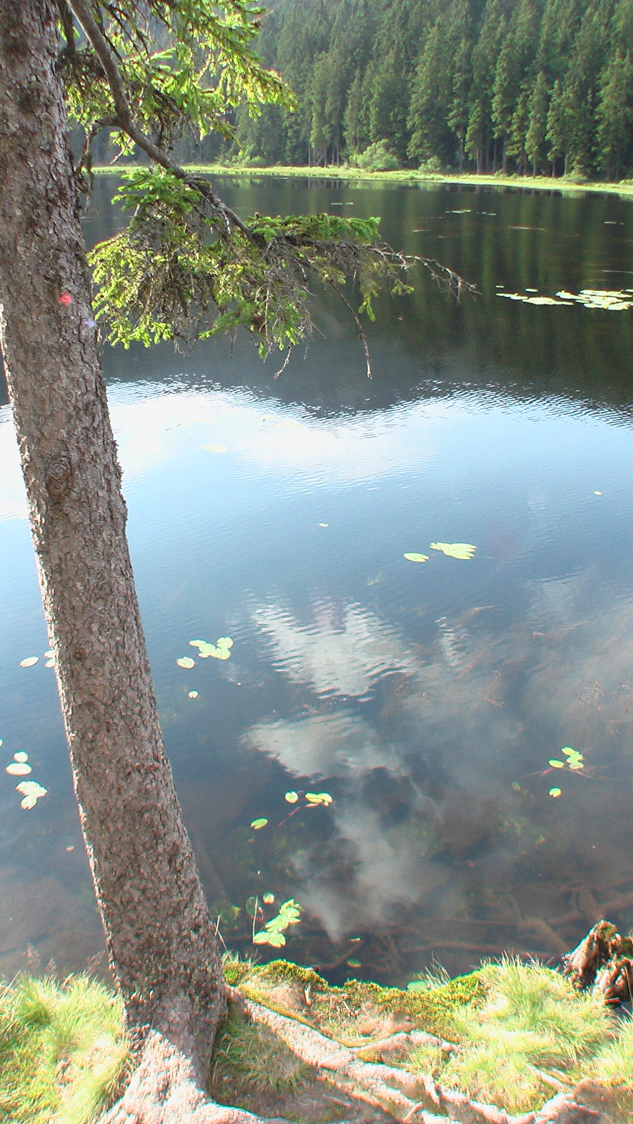 GrosserArberseeAnsicht3